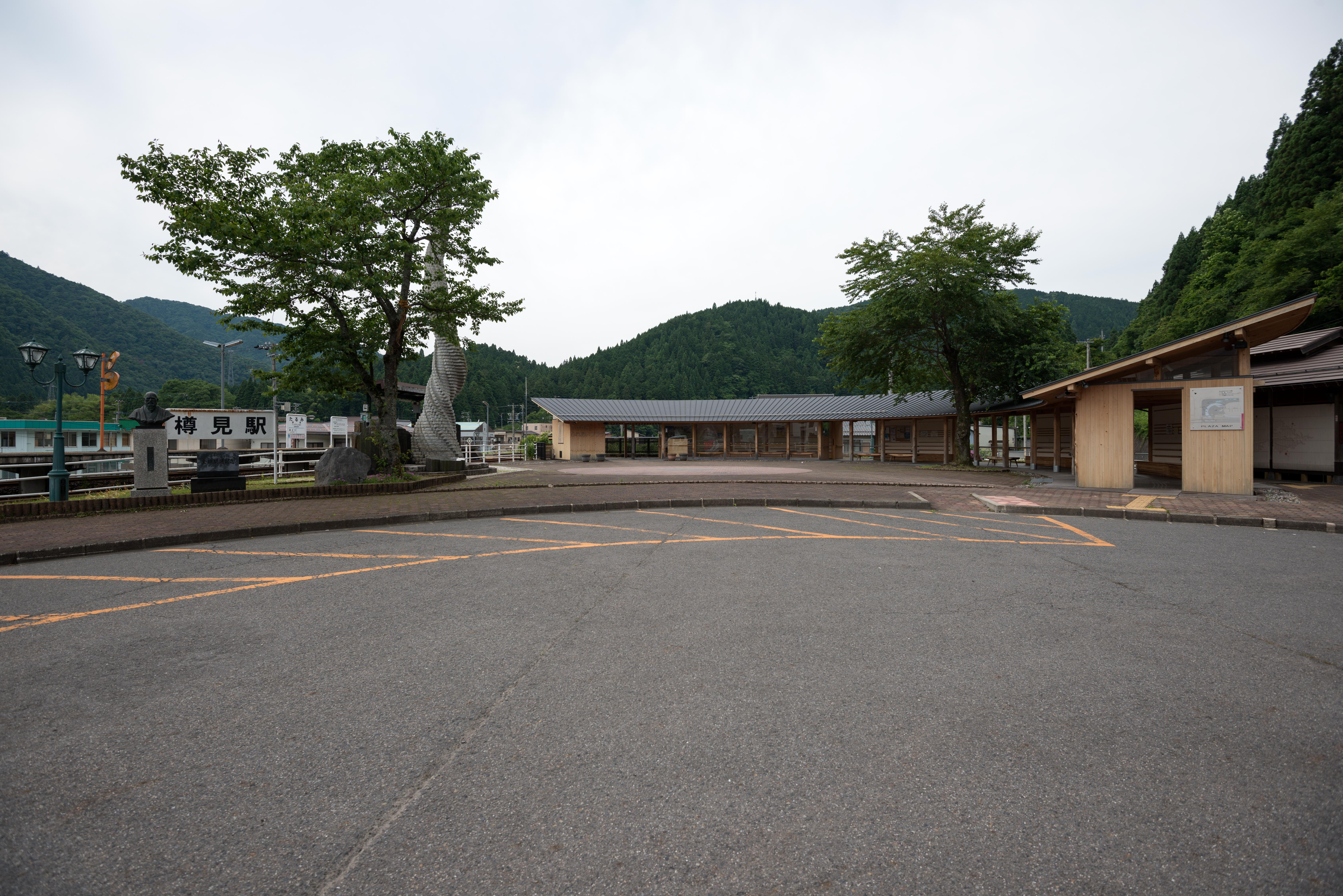 樽見鉄道 樽見駅 (2012年6月)